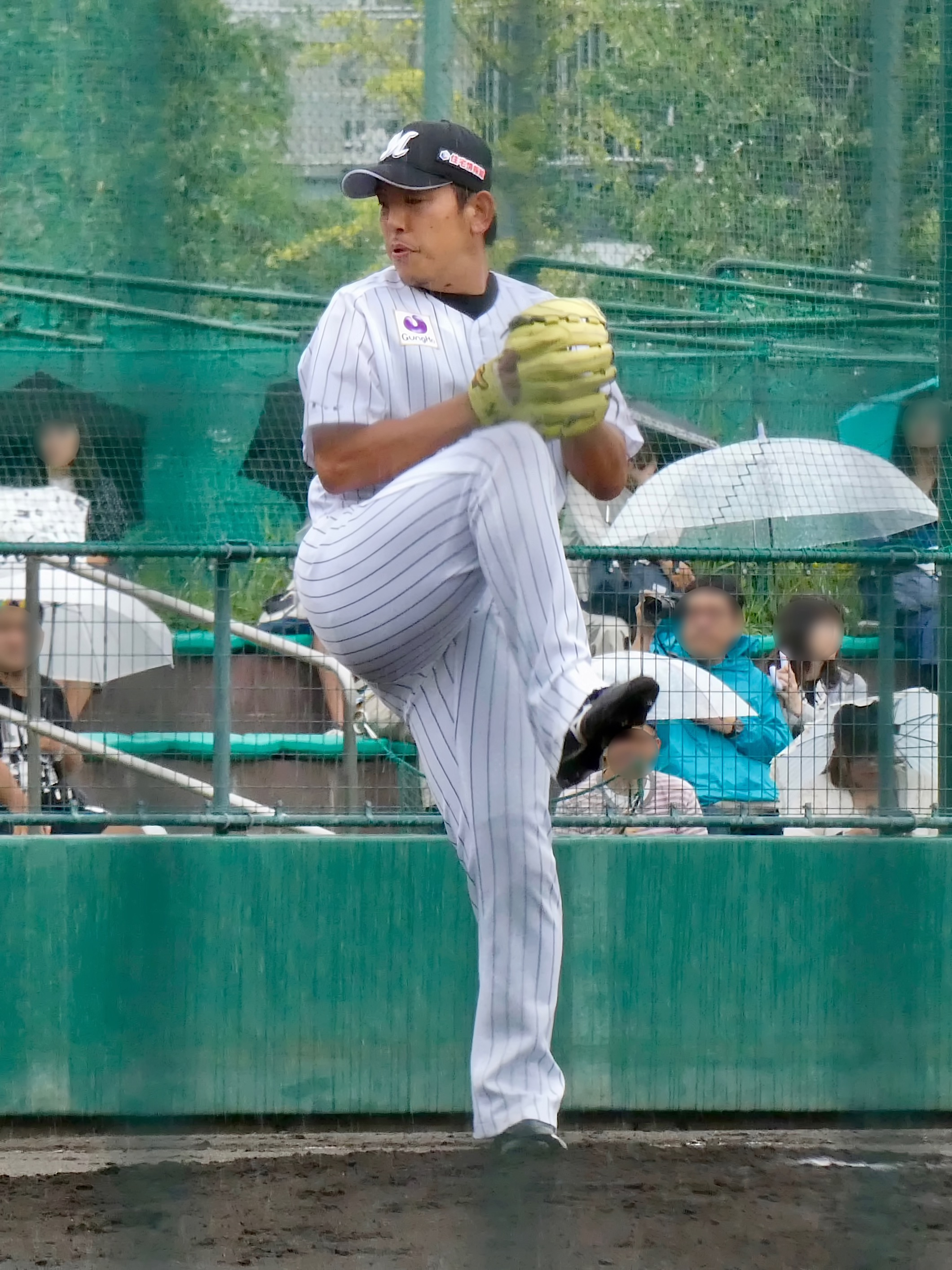 福岡ソフトバンクホークスの選手。ロッテ浦和球場にて。